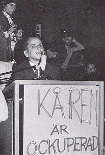 Maj natt 1968 Olof Plame på besök i ockuperade kårhuset under Kårhusockupationen. Utbildningsminister Olof Palme diskuterar demokrati med ockupanterna.